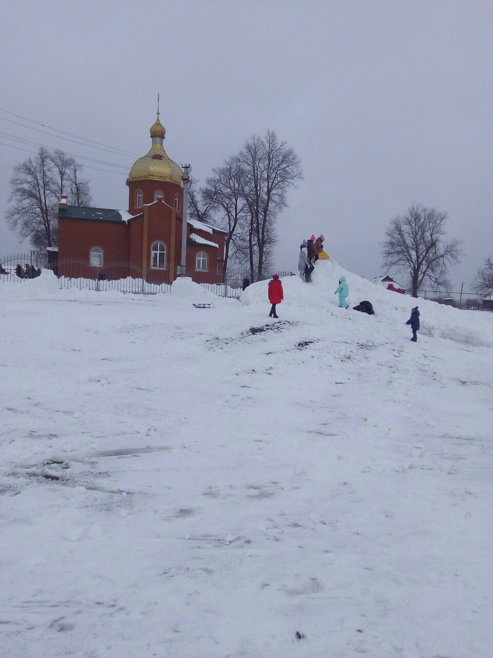 Ольшана Масляная